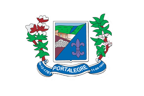 Bandeira do município de Portalegre, Rio Grande do Norte, Brasil.